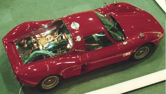 Bandini berlinetta "saloncino" Foto tratta dal sito